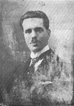 Luis Joaquín Miró Quesada de la Guerra. Periodista, diplomático y político peruano. Alcalde de Lima y director del diario El Comercio.